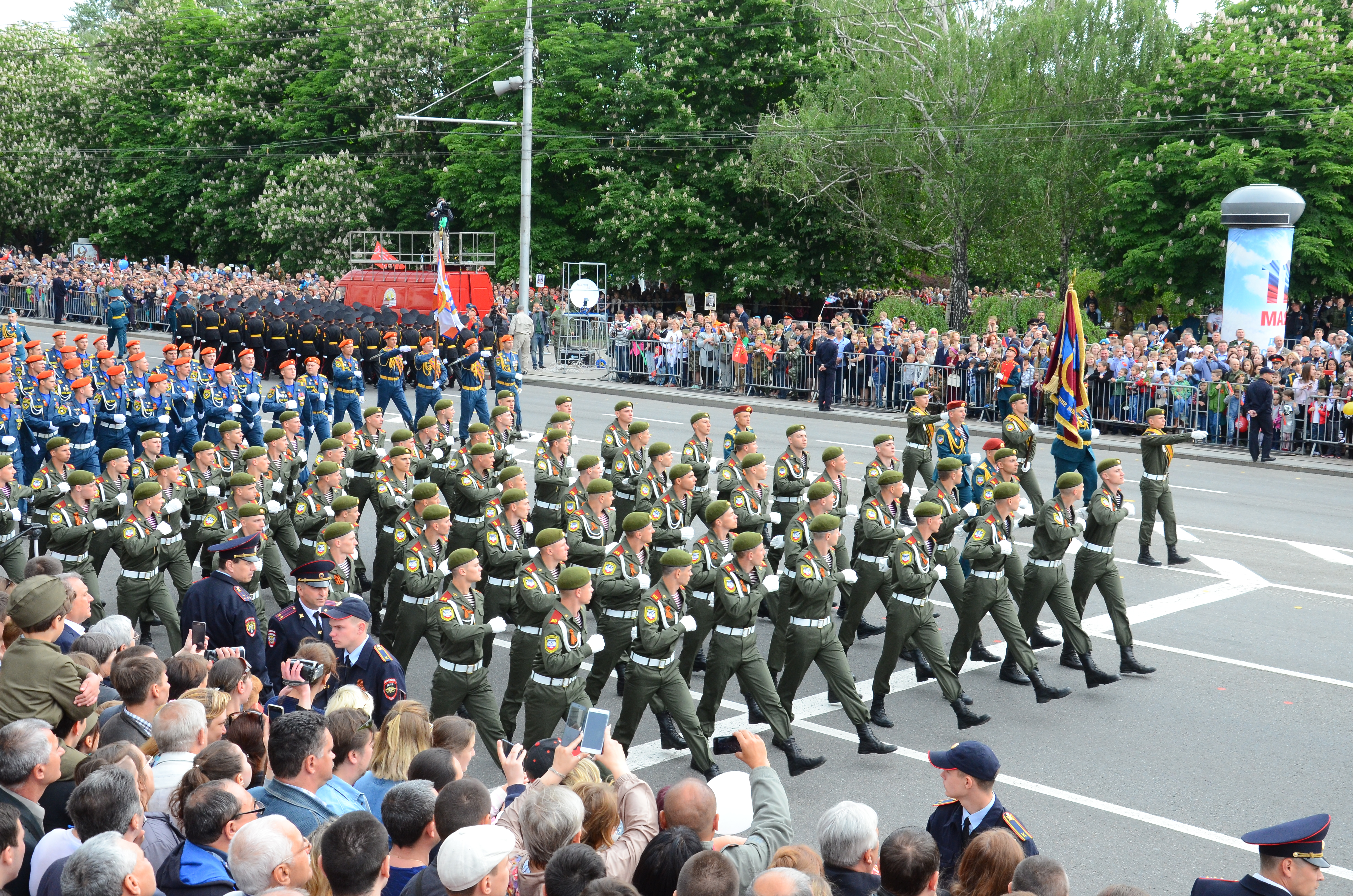 День Победы в Донецке